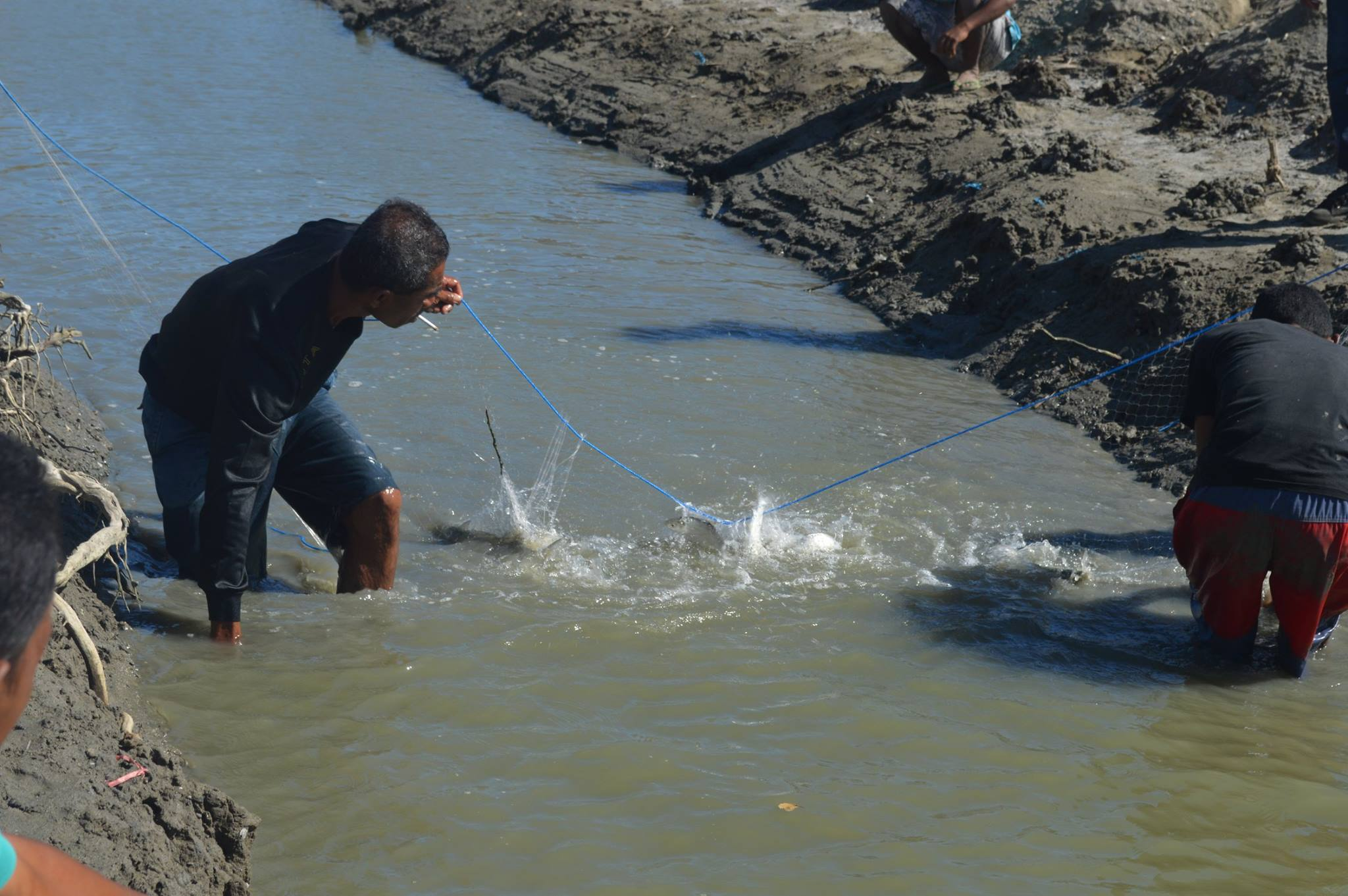 Fischer in Oecusse